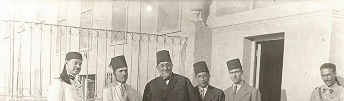 الزعيم الحبيب بورقيبةوعبد العزيز الثعالبي